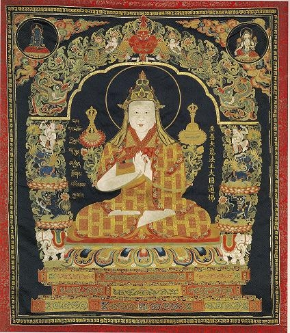 释迦也失真容唐卡，以缂丝织成。现存拉萨的色拉寺大经堂。